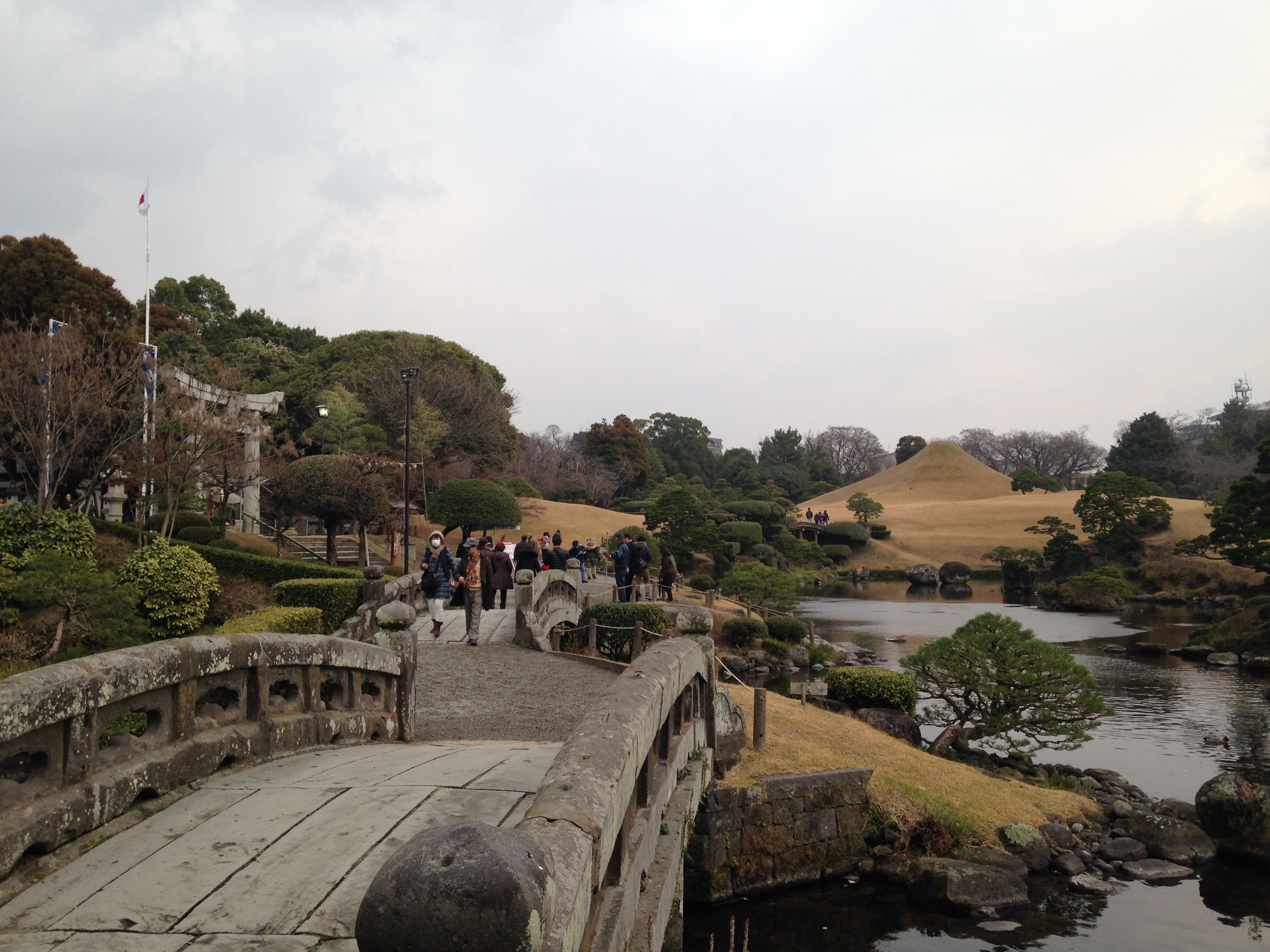 水前寺成趣園の石橋と出水神社の鳥居